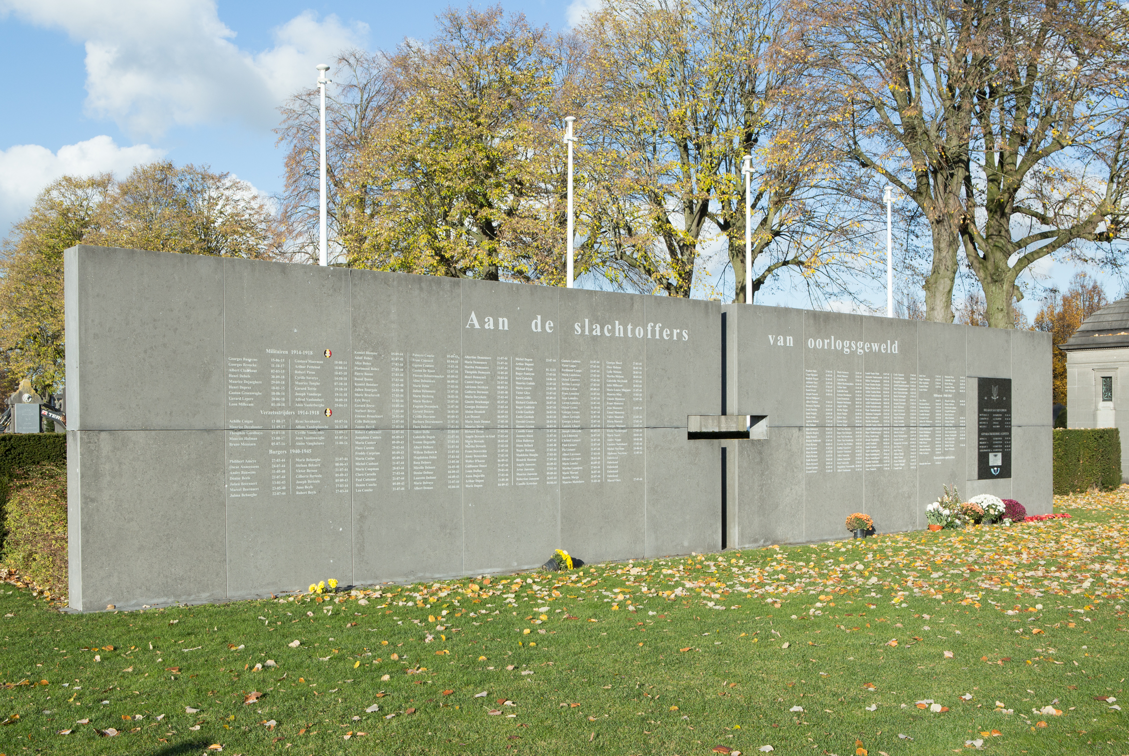 Begraafplaats van Kortrijk (St. Jan)